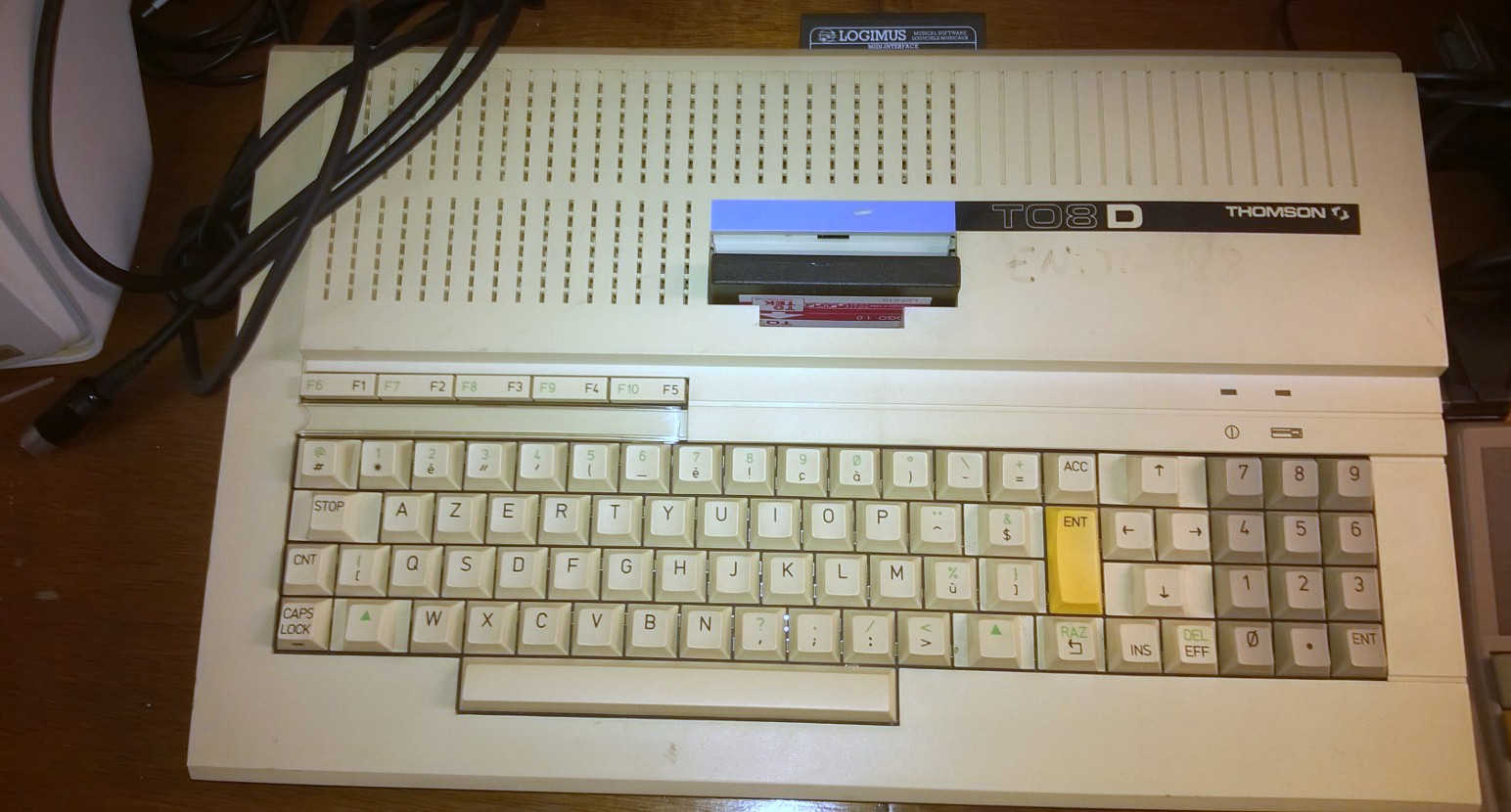 Thomson TO8D, clavier AZERTY.